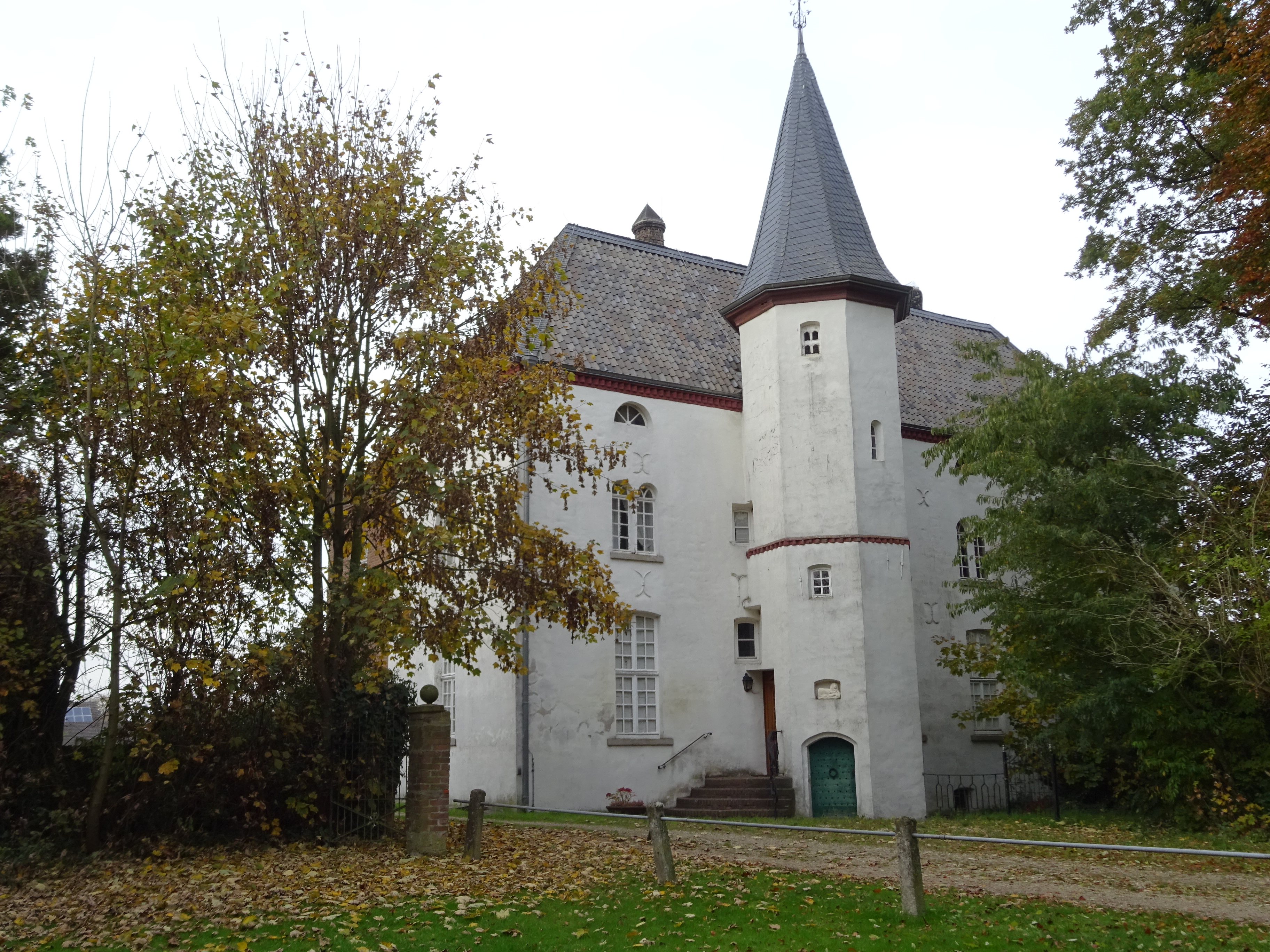 Haus Kemnade in Kalkar-Wissel